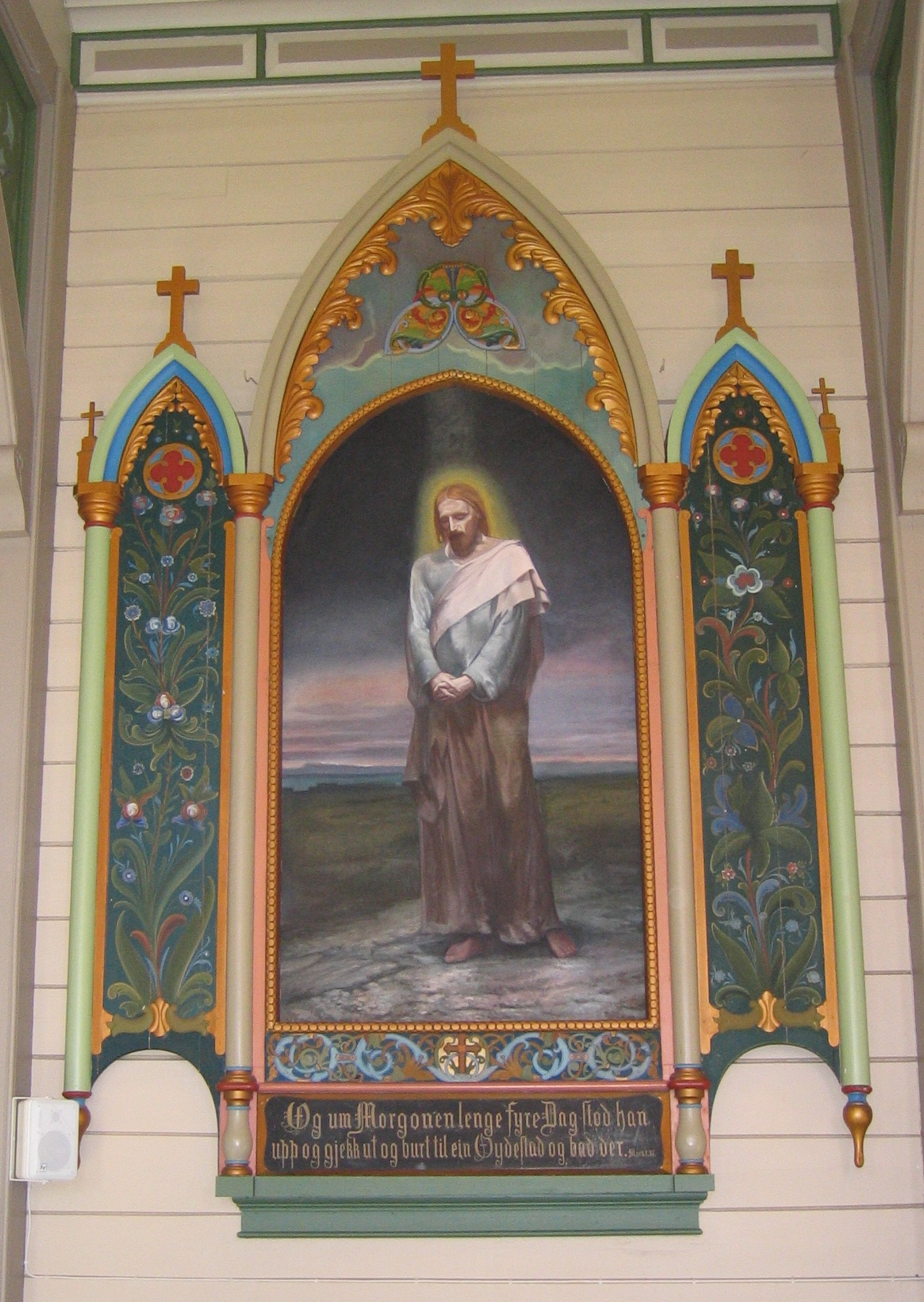 Alteravle, måla og skoren av Lars Kinsarvik. Målarstykker er ein kopi etter Marcus Gønvold si altertavle til Johanneskyrkja i Bergen .